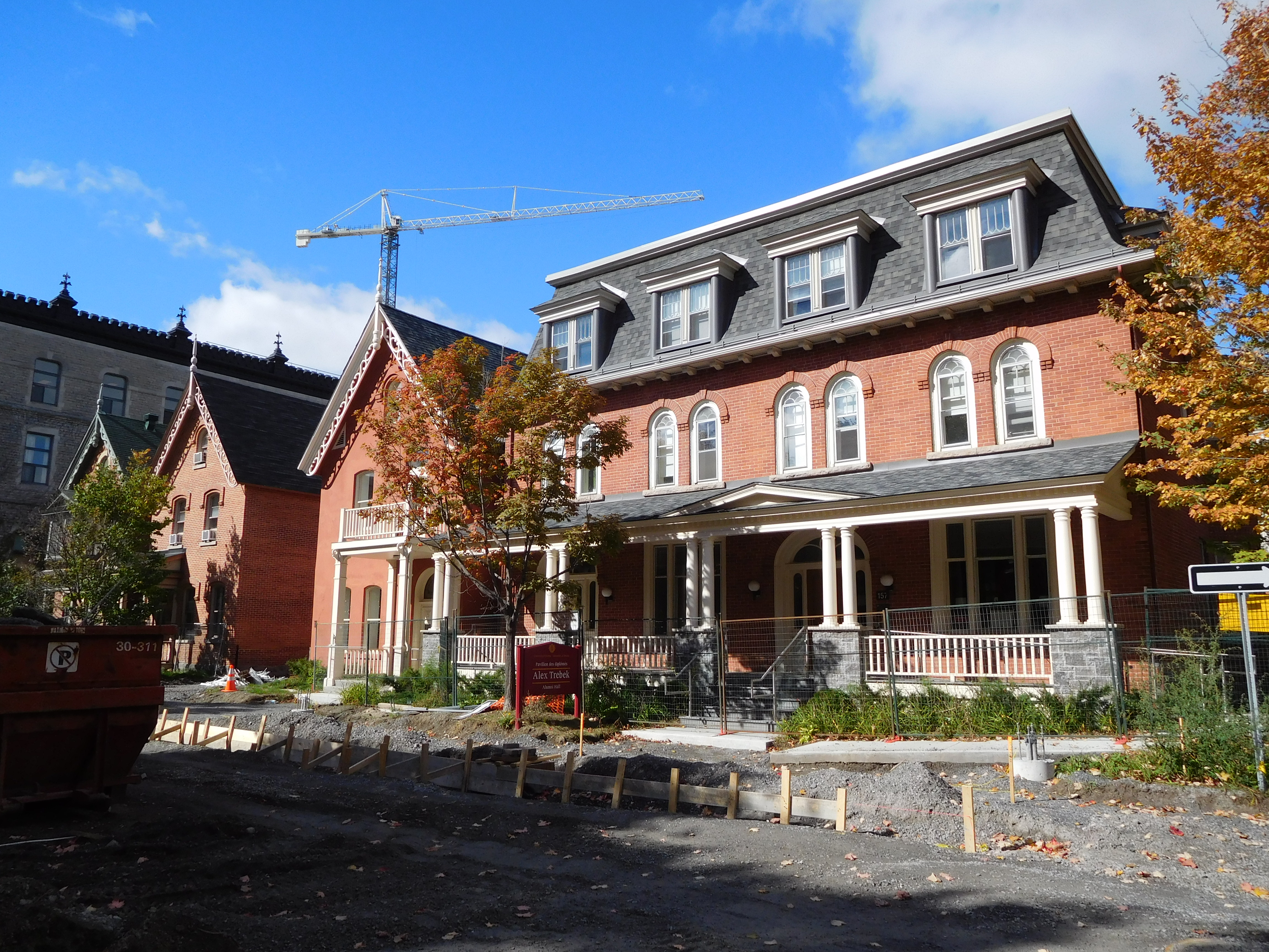 Pavillon des diplômés Alex-Trebek, 157 Séraphin-Marion, Ottawa uottawa.ca